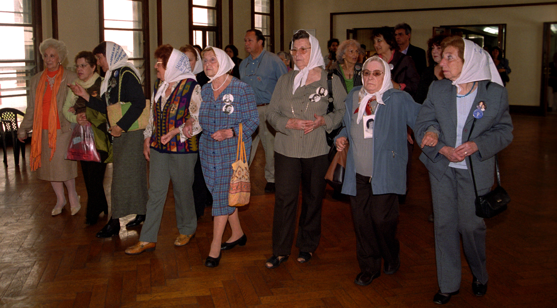 La Ministra de Defensa Nilda Garré encabezó el acto de entrega de las instalaciones de la antigua ESMA a la comisión bipartita que desde ese momento coordina su funcionamiento, integrada por la Secretaría de Derechos Humanos de la Nación y la Subsecretaría de Derechos Humanos del Gobierno de la Ciudad de Buenos Aires